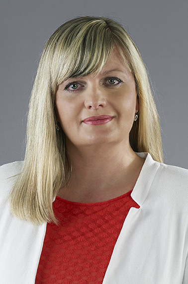 foto Zuzany Kailové poslankyně Parlamentu České republiky